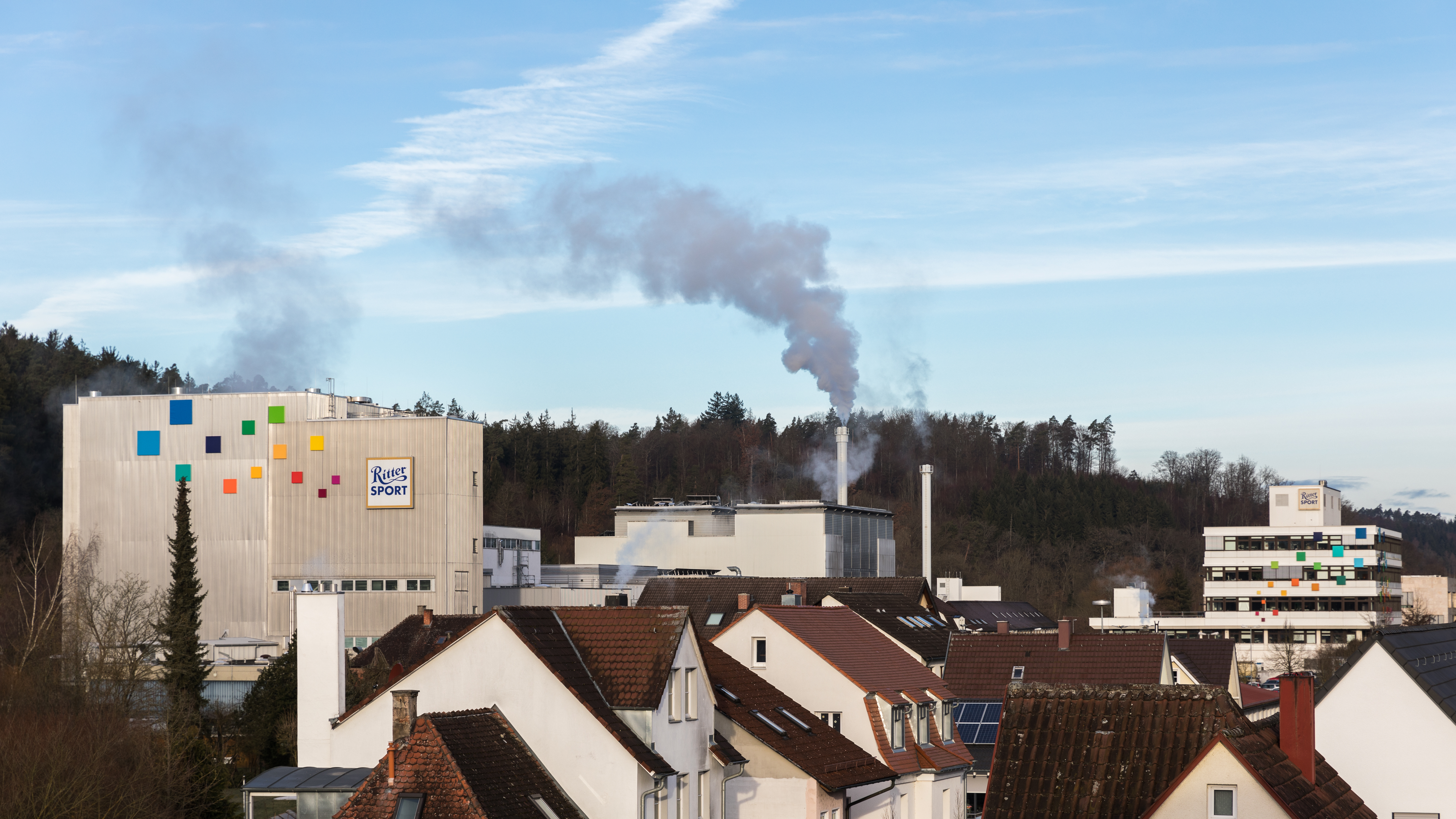 Ritter Sport Produktion in Waldenbuch